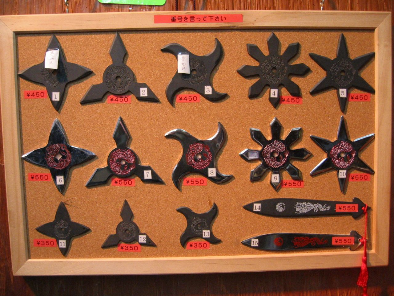 hand hidden blades